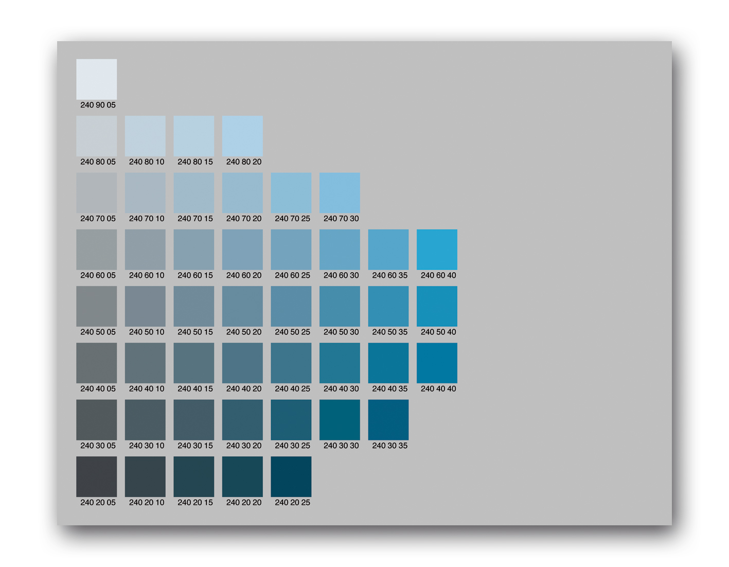 Die 1.625 Farben im RAL DESIGN System sind nach dem CIELab System geordnet.